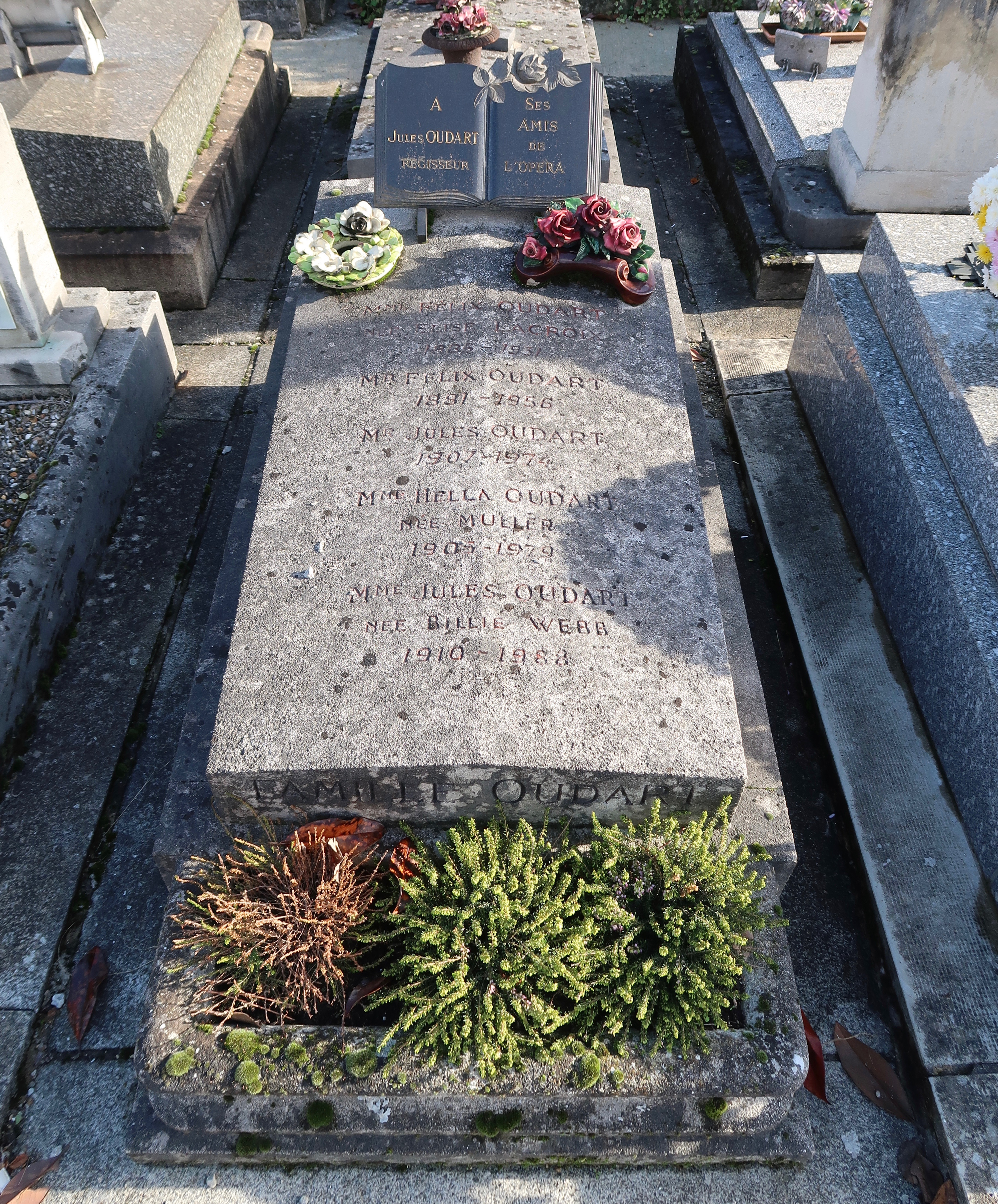 Tombe de Félix Oudart dans le cimetière Voltaire (division 2 bis) de Suresnes (Hauts-de-Seine).